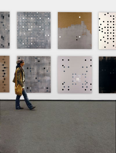 Abstrakte Malerei/Absolute Malerei von Pedro Boese.